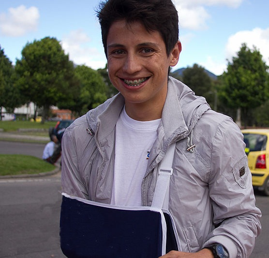 Esteban Chaves8ª. Eta. Vuelta a Colombia 2013 Ibagué - Bogotá (213Km)Domingo 16 de junio de 2013